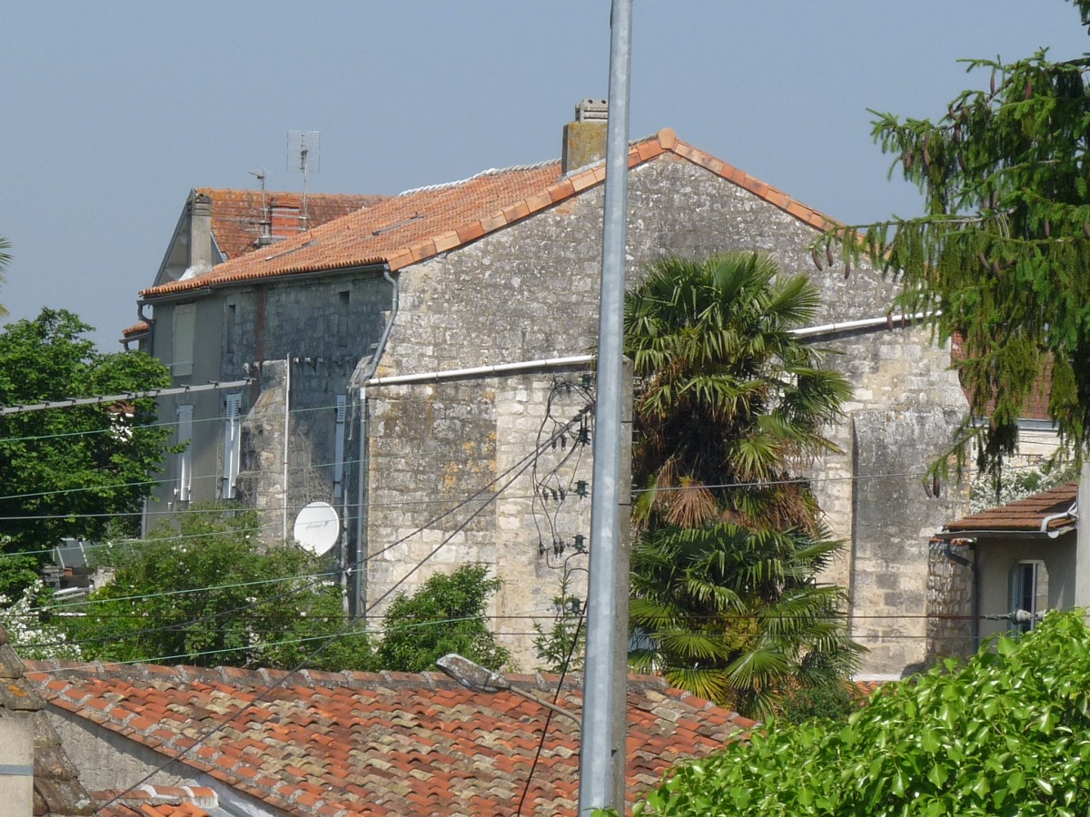 Ancienne église St-Martin, vue de l'est (Angoulême, France)